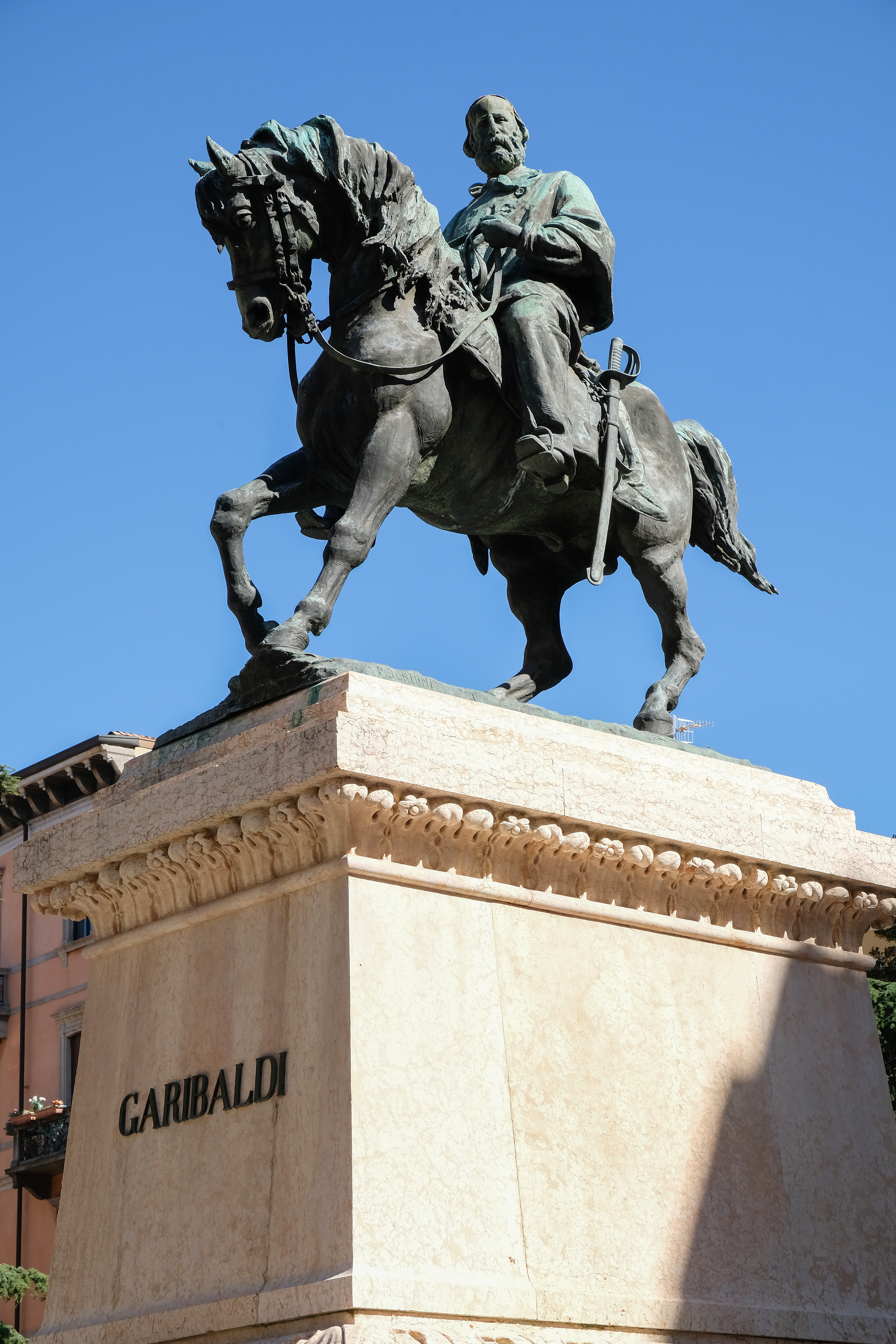 monumento a Giuseppe Garibaldi This is a photo of a monument which is part of cultural heritage of Italy.